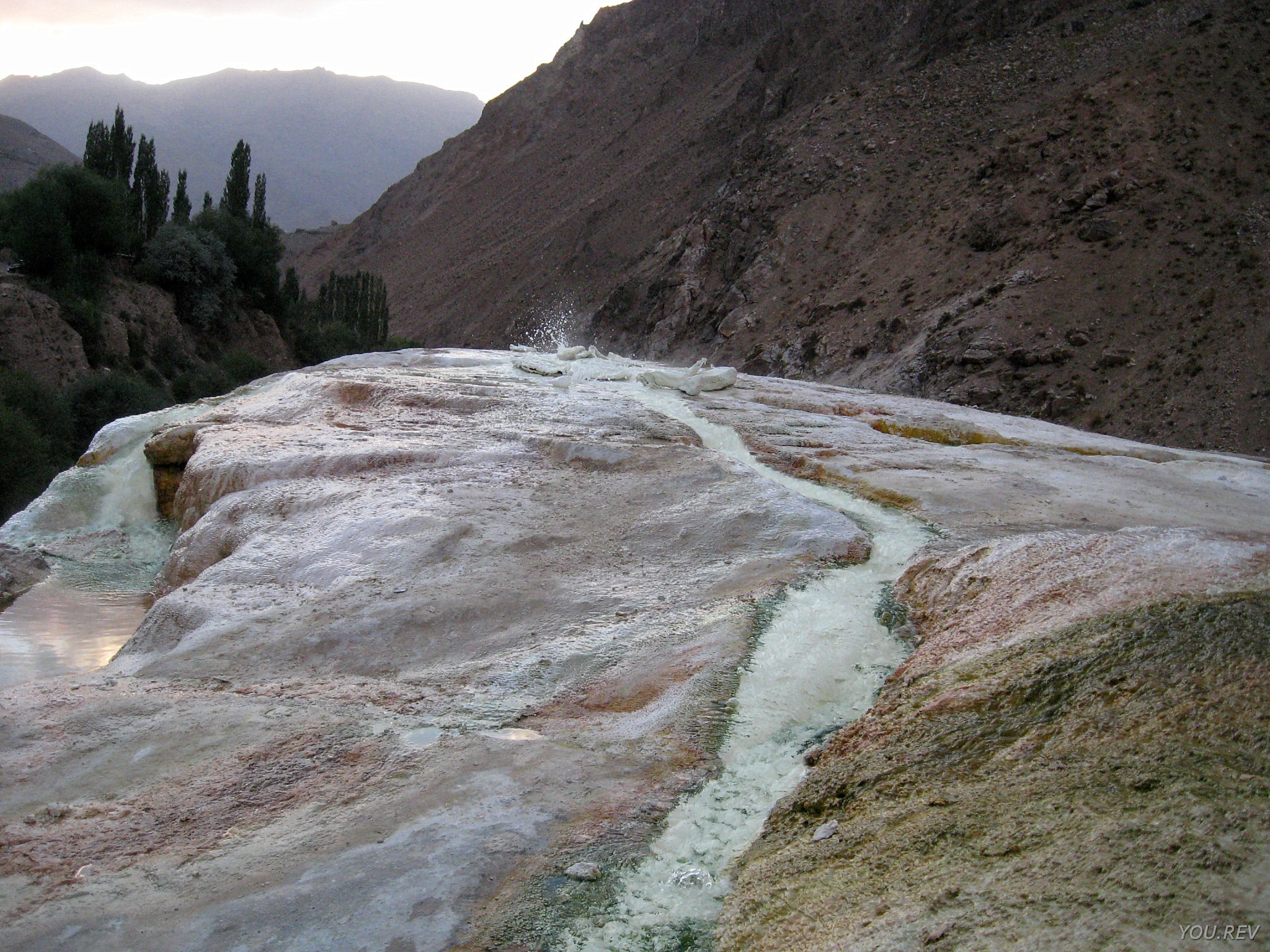 Один из источников которые наполняют бассейн